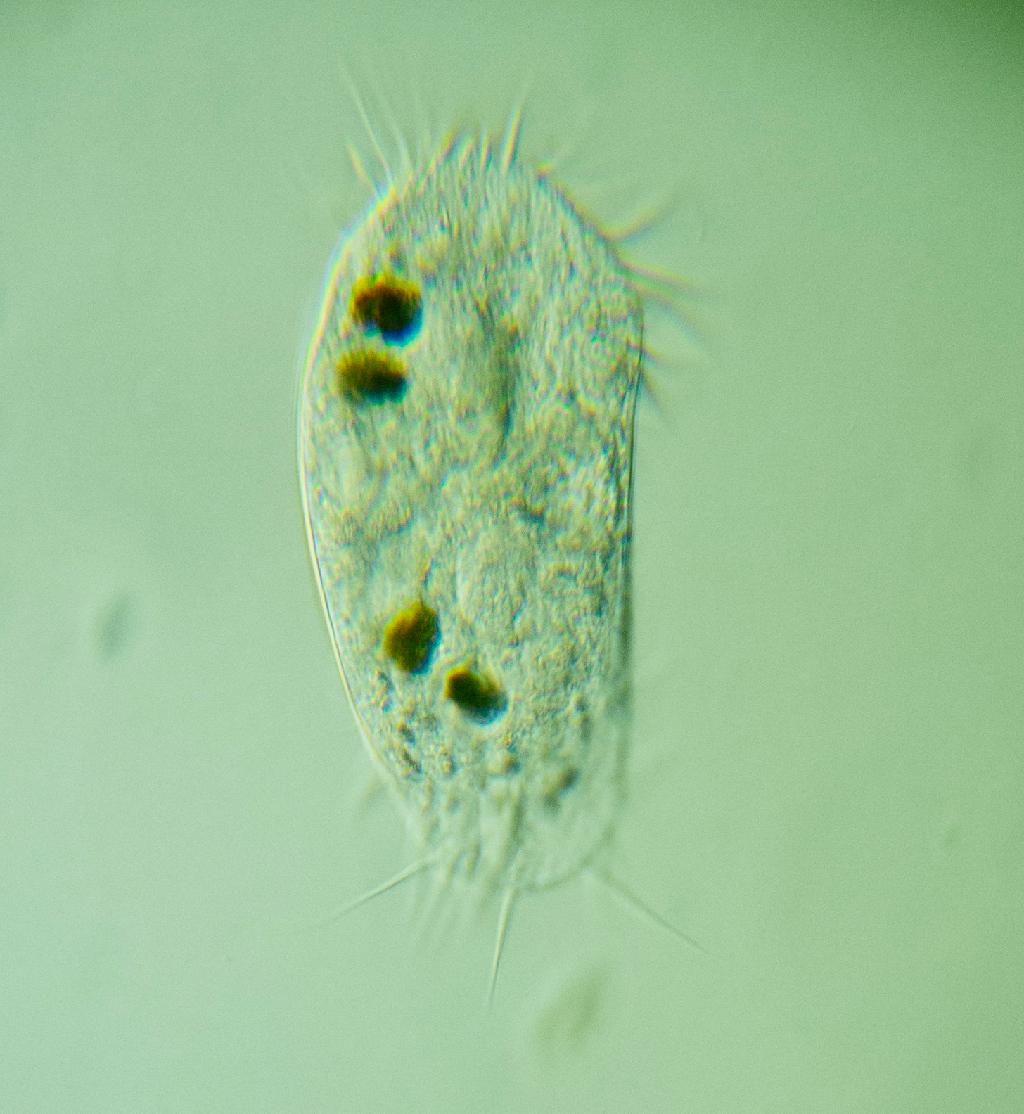 Schiefe Beleuchtung Zeiss Planapochromat 25x, Okular KPL 10x Brille